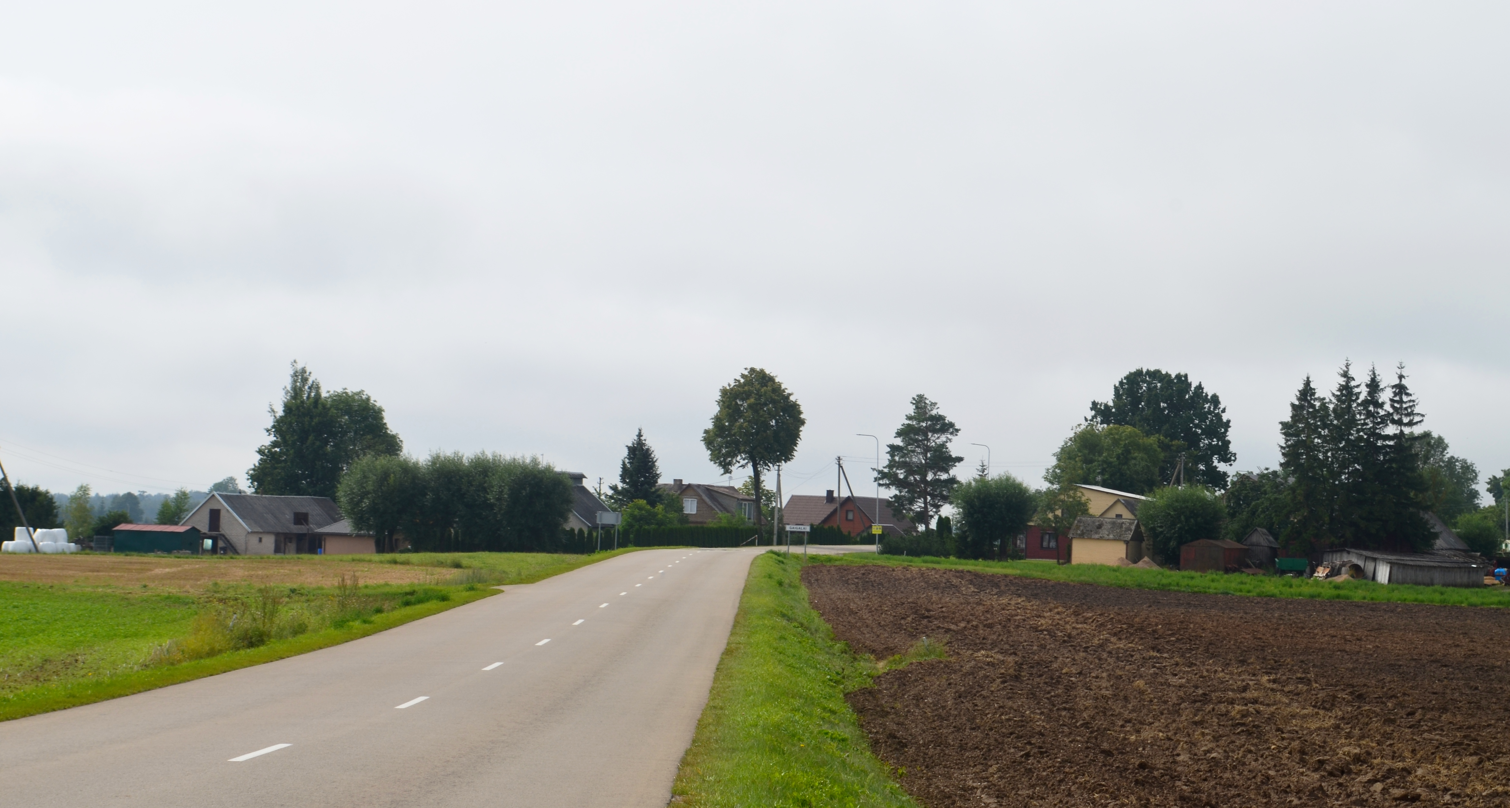 Gaigalai, Kauno raj.